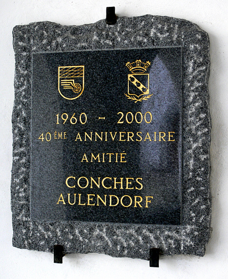 Aulendorf, Denkmal 40 Jahre Städtepartnerschaft mit Conches (Frankreich) (im Schlosshof)